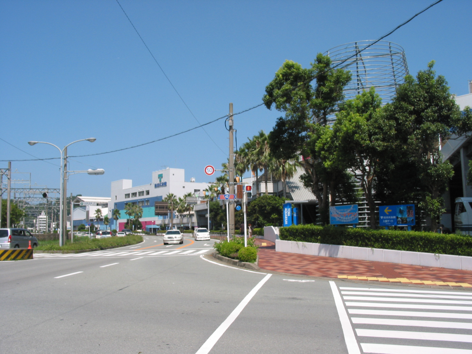 2006/09/03 三重県鳥羽市鳥羽3丁目にて投稿者撮影